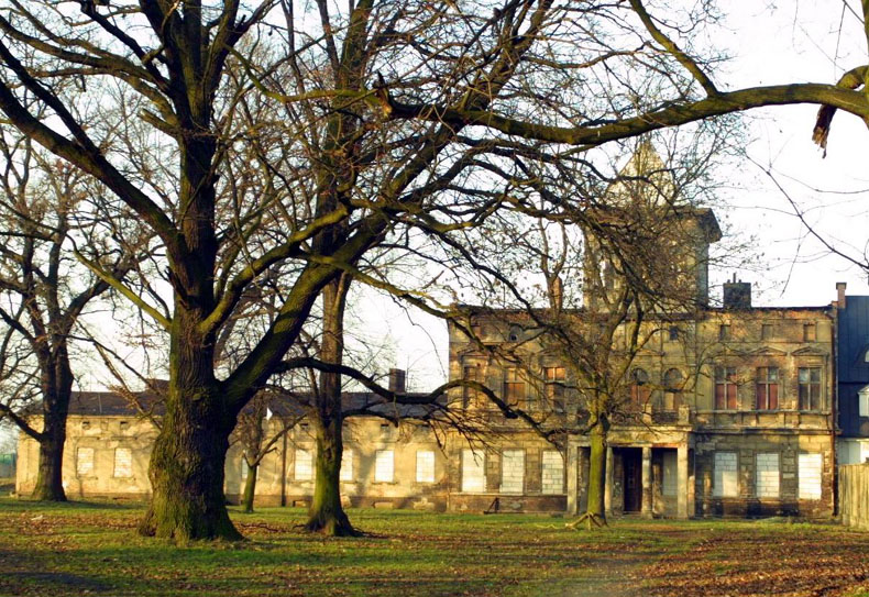 Poznań Morasko, ul. Sióstr Misjonarek 5 - pałac (eklektyczna willa pałacowa), teren folwarku (zabytek nr A 394)